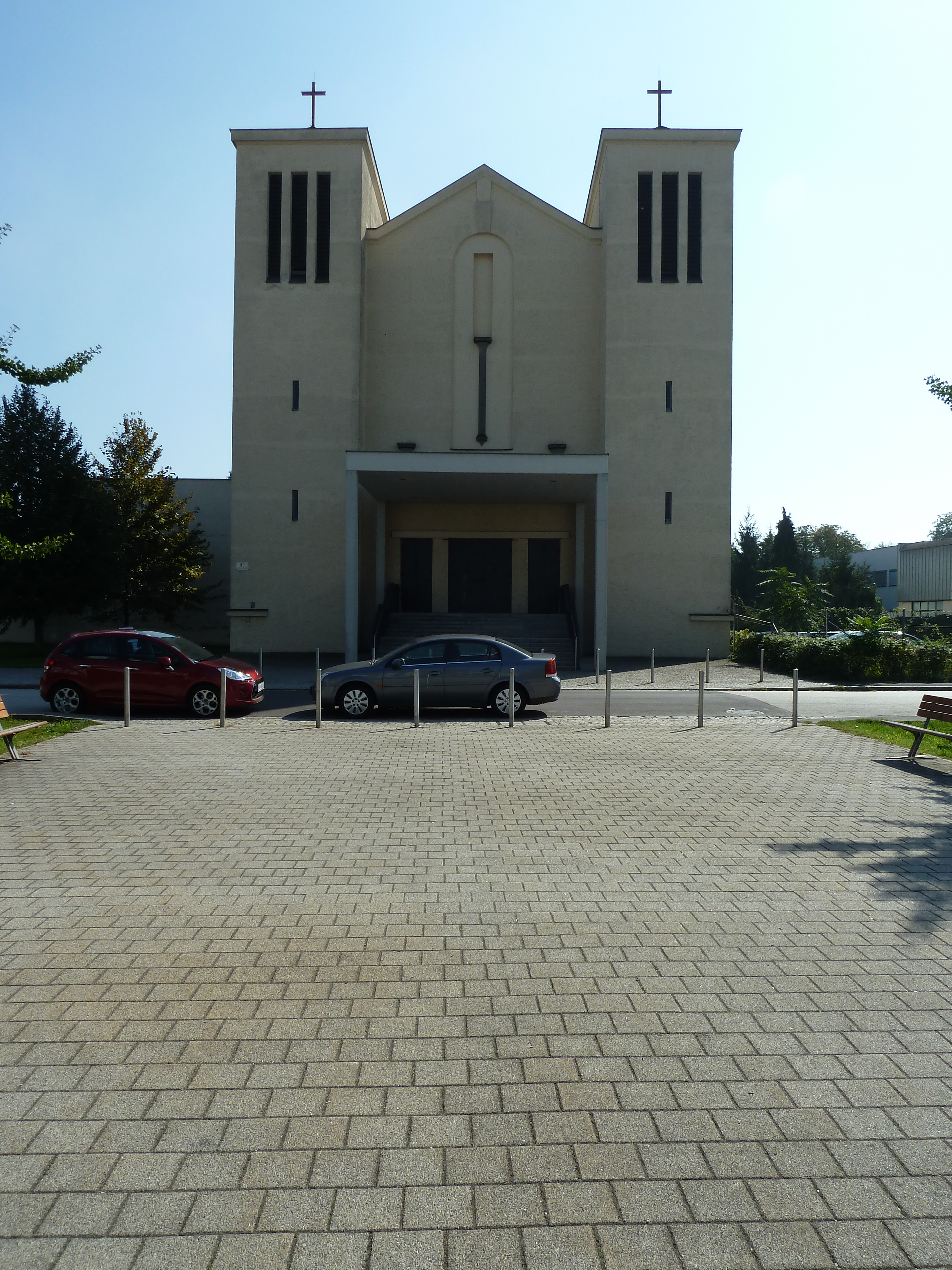 Kath. Pfarrkirche, Don-Bosco-Kirche